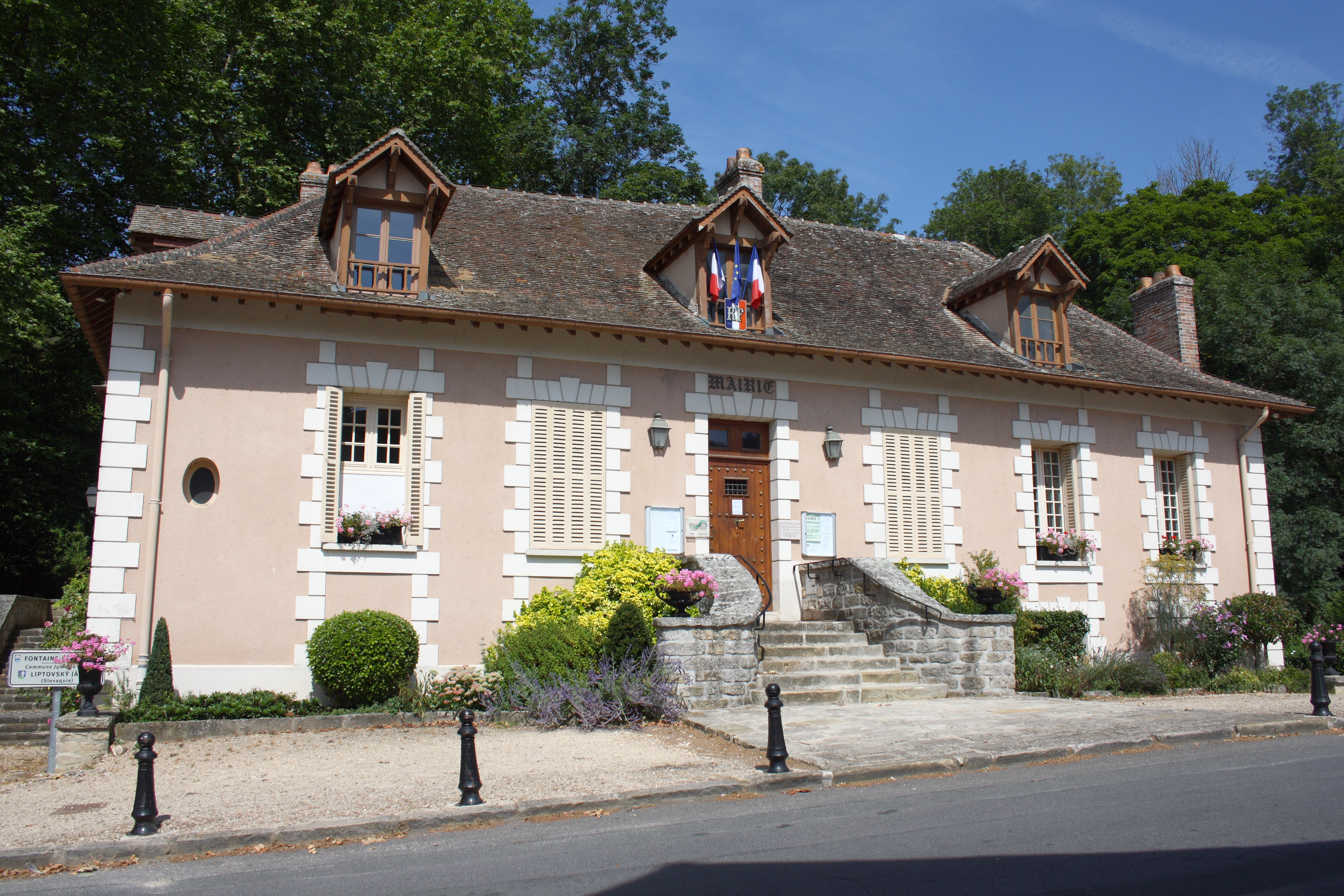 Bürgermeisteramt (Mairie) in Fontaine-le-Port im Département Seine-et-Marne (Île-de-France)